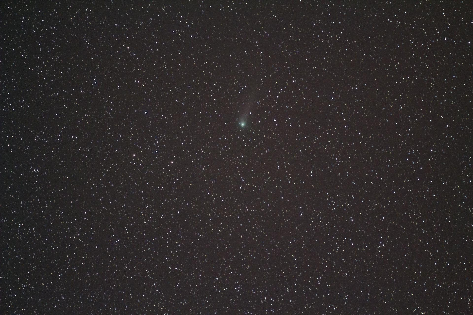 C/2013 US10 (Catalina) - 7 февраля 2016 года - Место съёмки: Беларусь, д.Аксаковщина - Фотоаппарат Canon 550D Объектив Юпитер 21М Одиночный кадр, выдержка 3 мин. ISO 1600. Автор: Немкович Евгений - ( БКА - Белорусский клуб астрономии )